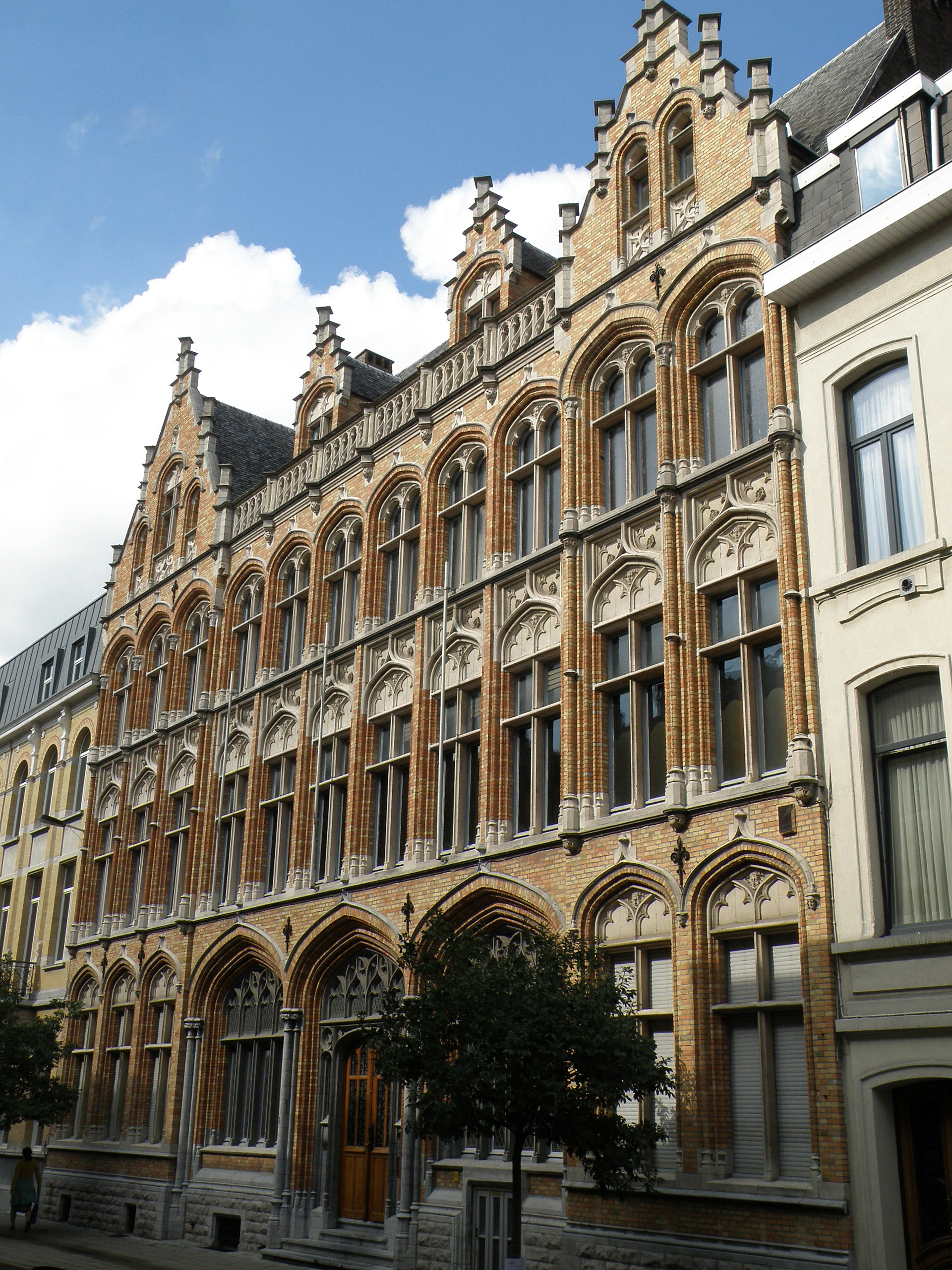 Antwerpen (België). Neogotisch Belpaire-instituut en Katholieke Vlaamse Hogeschool voor Vrouwen, aan de Jozef De Bomstraat nr.11, anno ca. 1900.